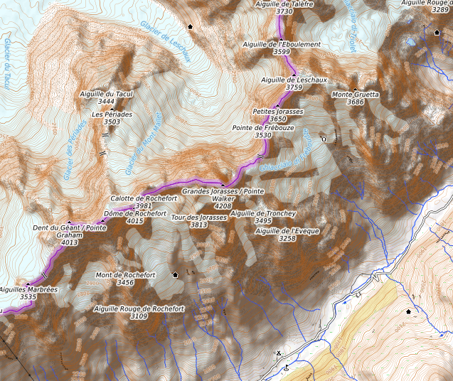 carte réalisée sur umap This map may be incomplete, and may contain errors. Don't rely solely on it for navigation.